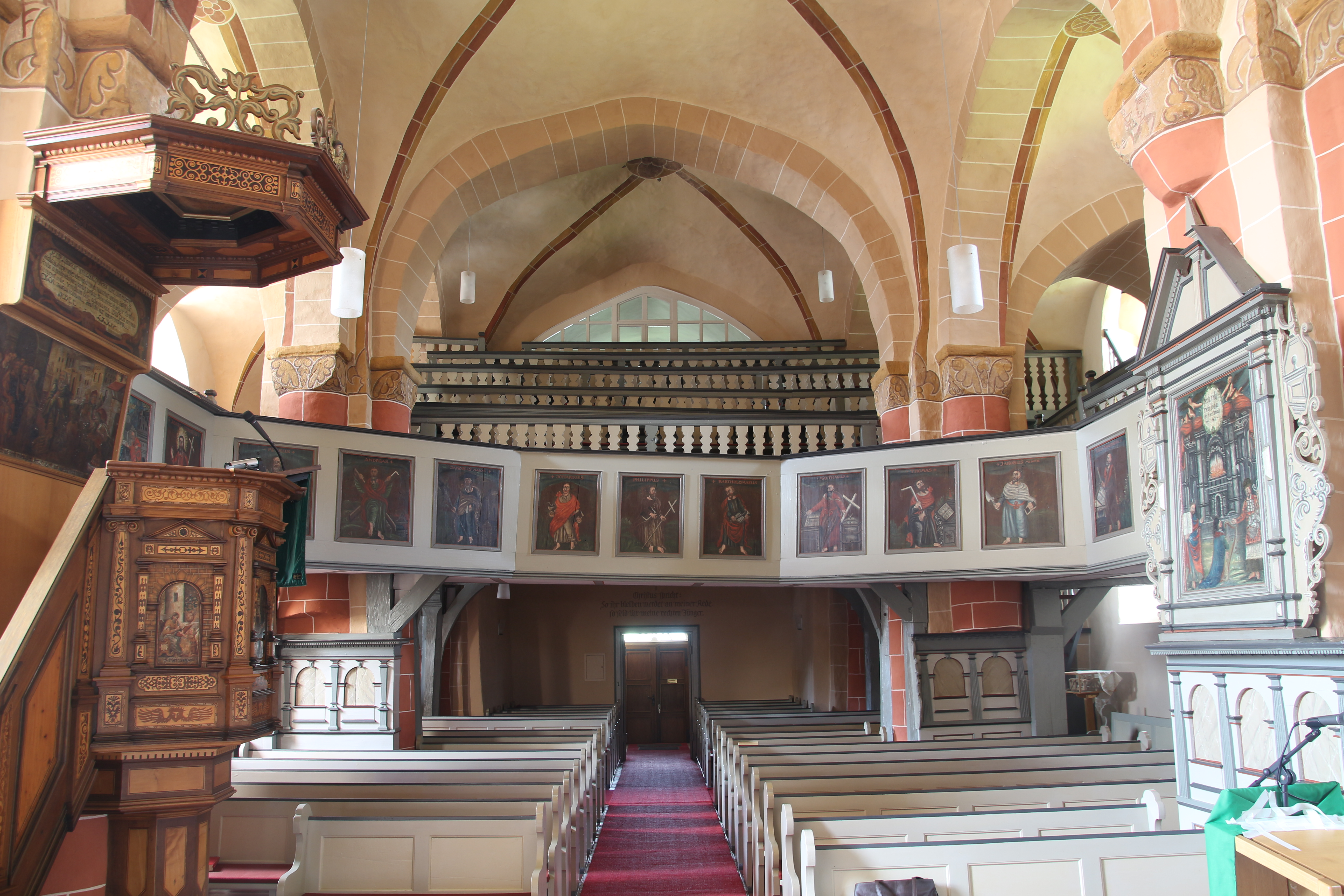 Evangelische Kirche Breidenbach, Landkreis Marburg-Biedenkopf, Hessen